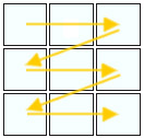 Illustration zum Artikel Comic - Grafische Erzählstrategien